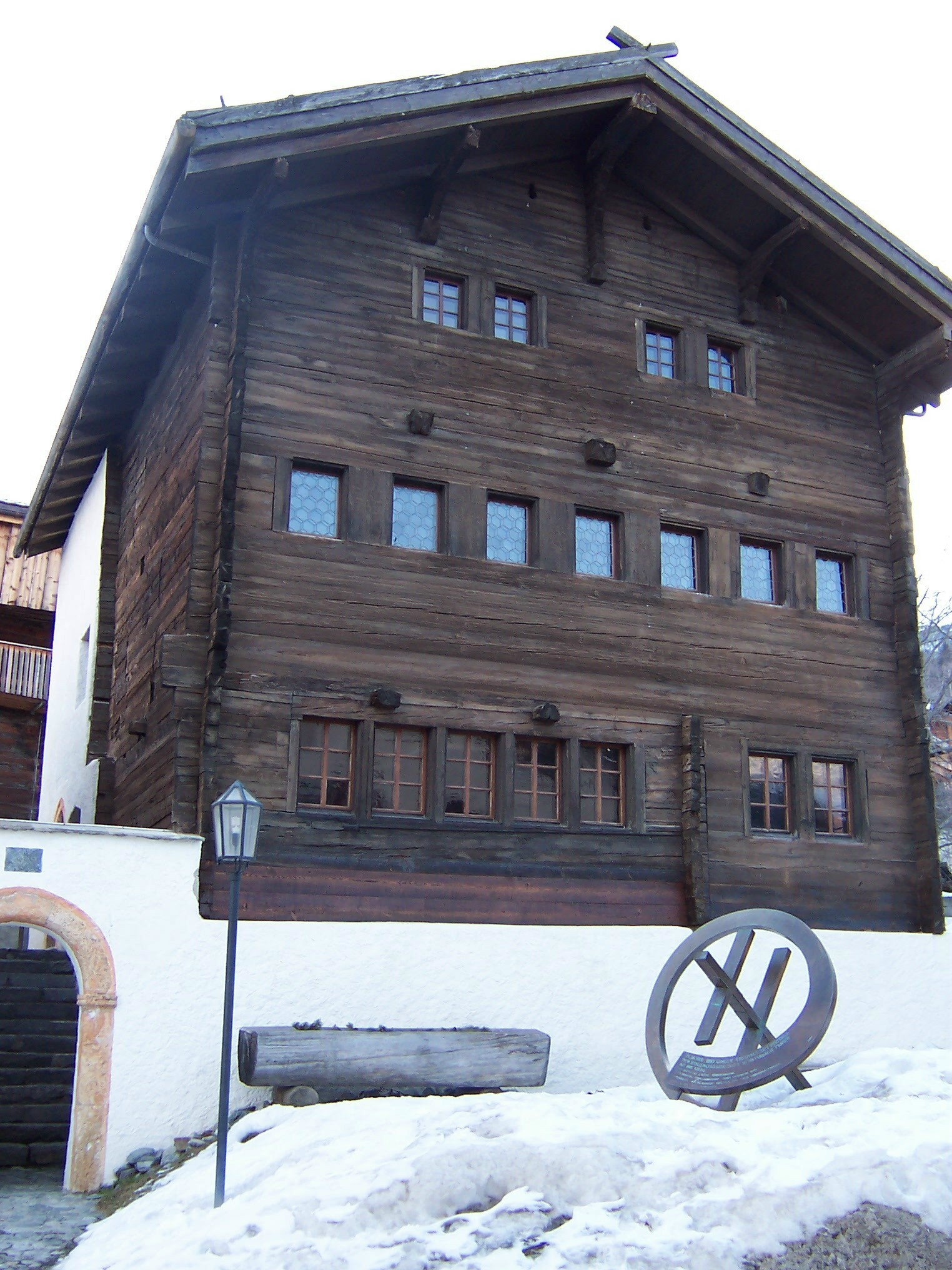 Das Alte Gemeindehaus oder Burgerhaus von Unterbäch, ein grosses traditionelles Walliserhaus, wurde 1575 gebaut. Die prachtvolle Gebäude steht unter eidgenössischem Denkmalschutz.